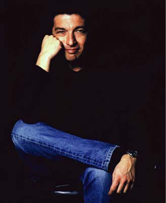 Ricardo Darin. Foto del Ministerio de educacion. Publico.